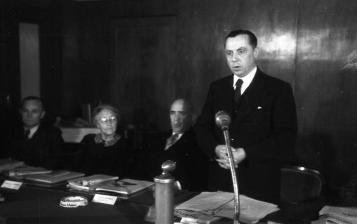 Ministerpräsidenten-Konferenz der Länder der 3 Westzonen Deutschlands auf dem Berghotel Rittersturz in Koblenz (v.l.n.r.: Dr. Hans Ehard, Louise Schroeder, Jakob Steffan, Peter Altmeier) 8.-10.7.1948